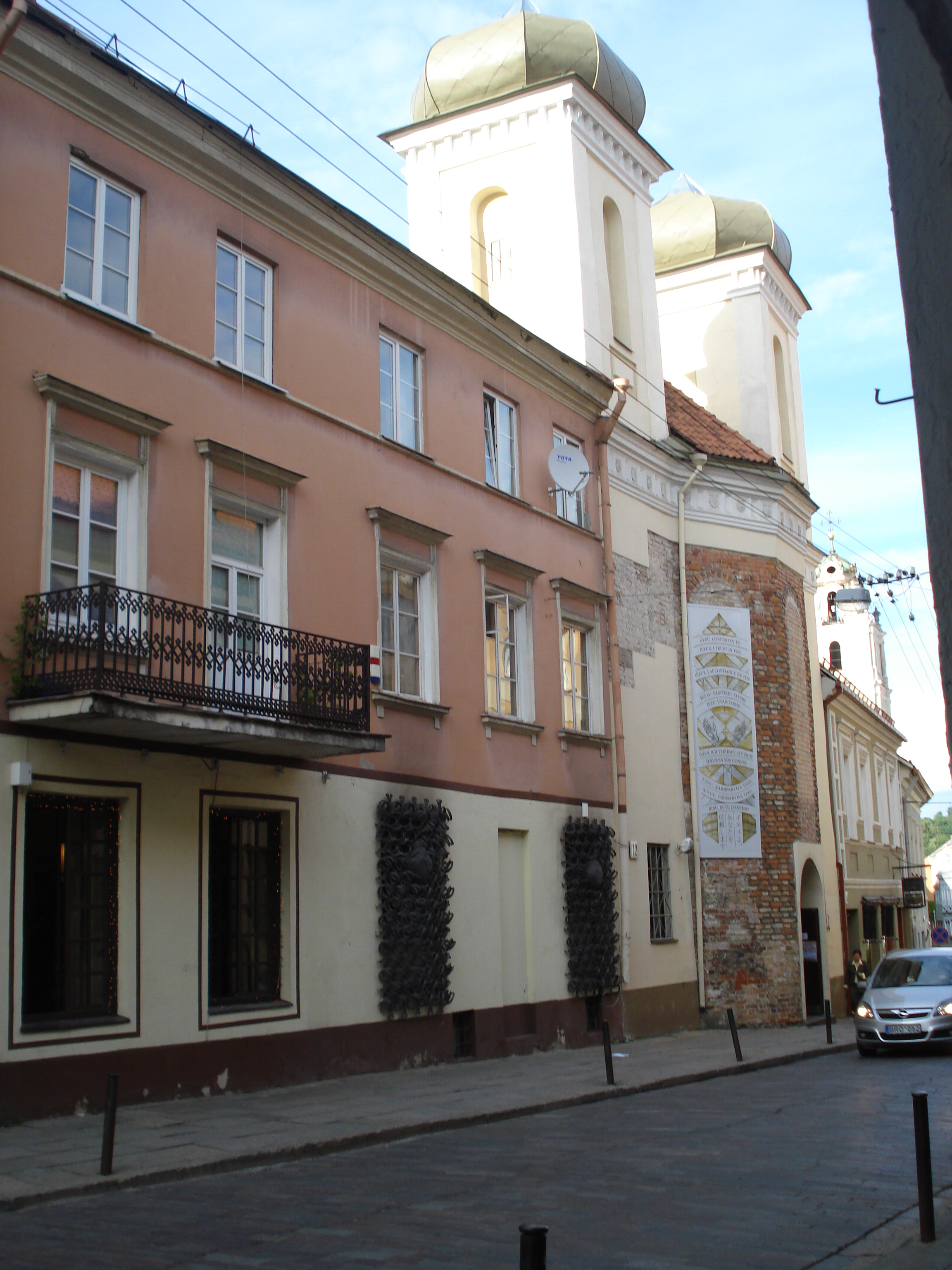 The Divine Mercy Sanctuary in Vilnius (Dievo Gailestingumo šventovė). Dominikonų g. 12